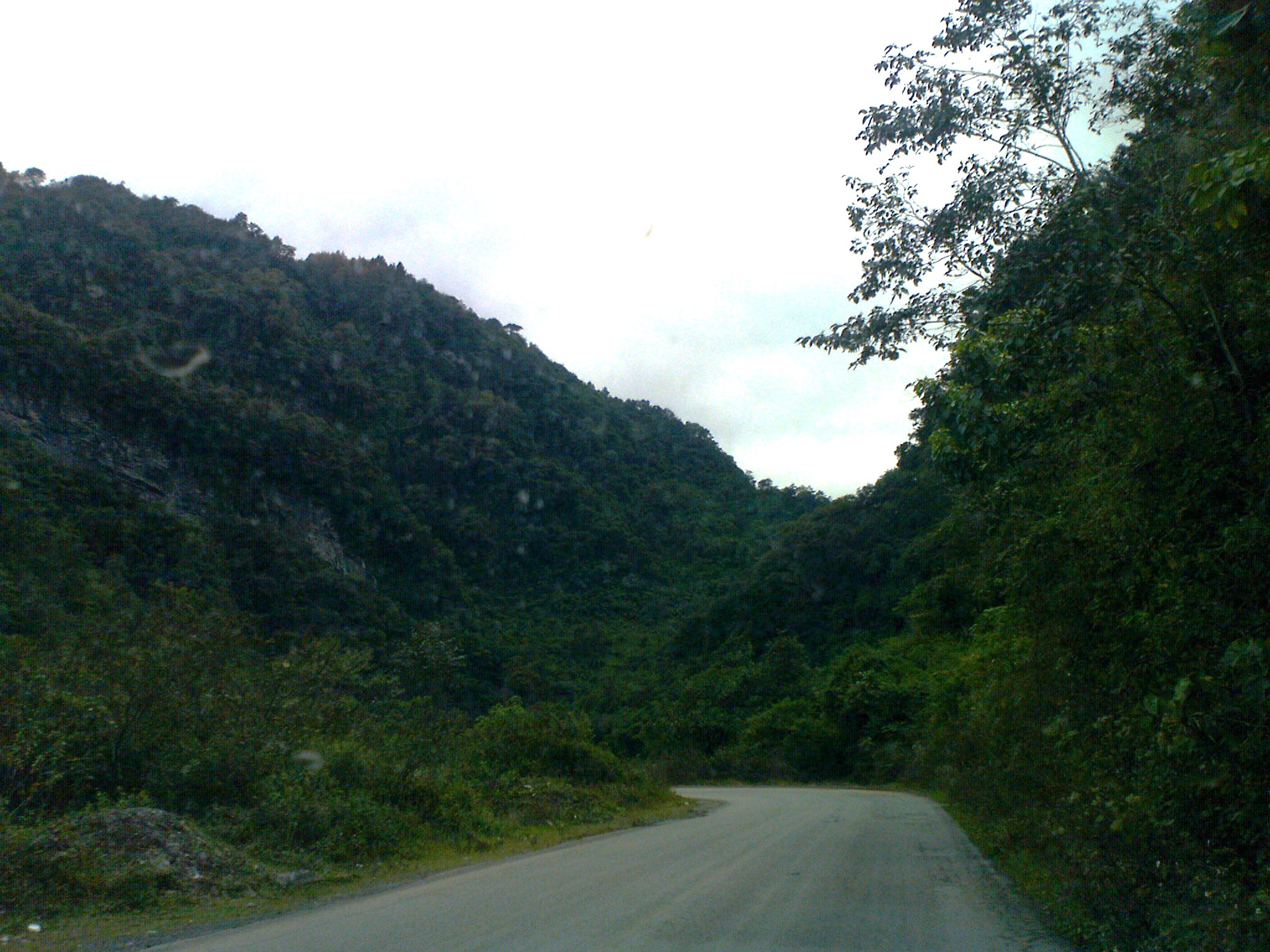 Sierra de Puebla.